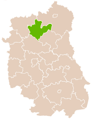 Map of Radzyń Podlaski county, Lublin voivodship Mapa powiatu radzyńskiego, województwo lubelskie